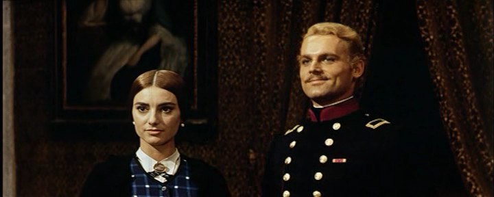 Screenshot del film Il Gattopardo (1963) di Luchino Visconti.